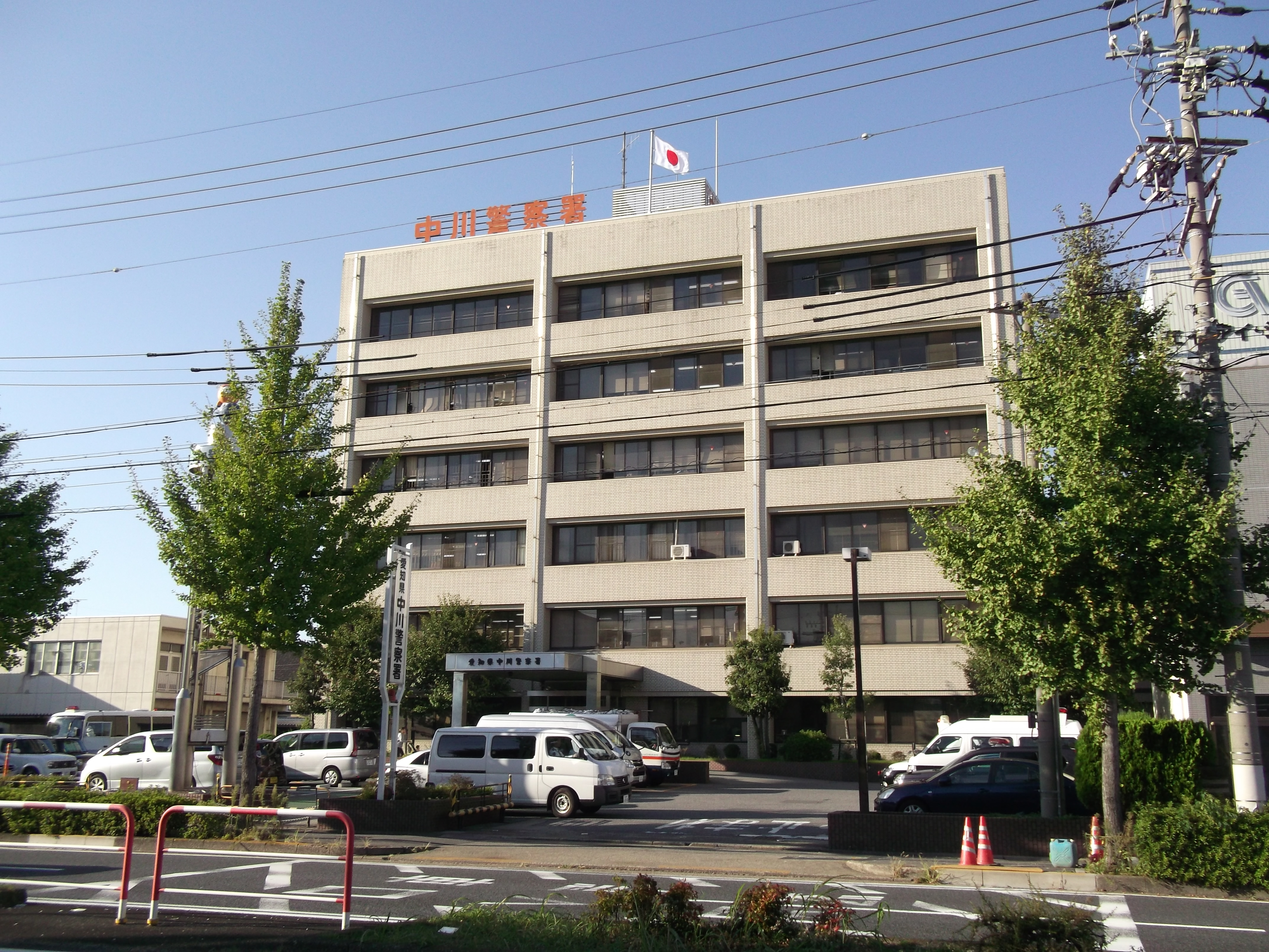 名古屋市中川区篠原橋通の愛知県警中川警察署を南側公道東側より撮影